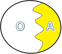 en el mecanismo de la proyección, O representa al organismo y A al ambiente, la línea ondulada es el límite de contacto